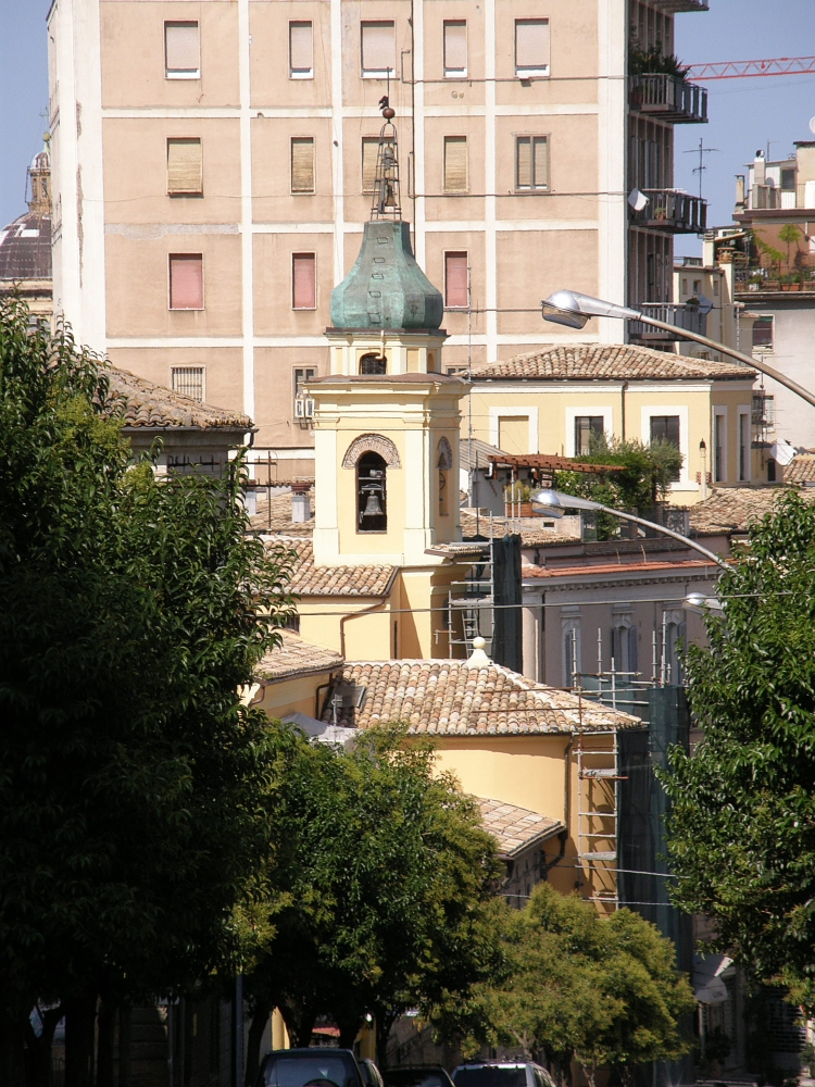 Chieti Campanile della Chiesa della Santissima Trinità